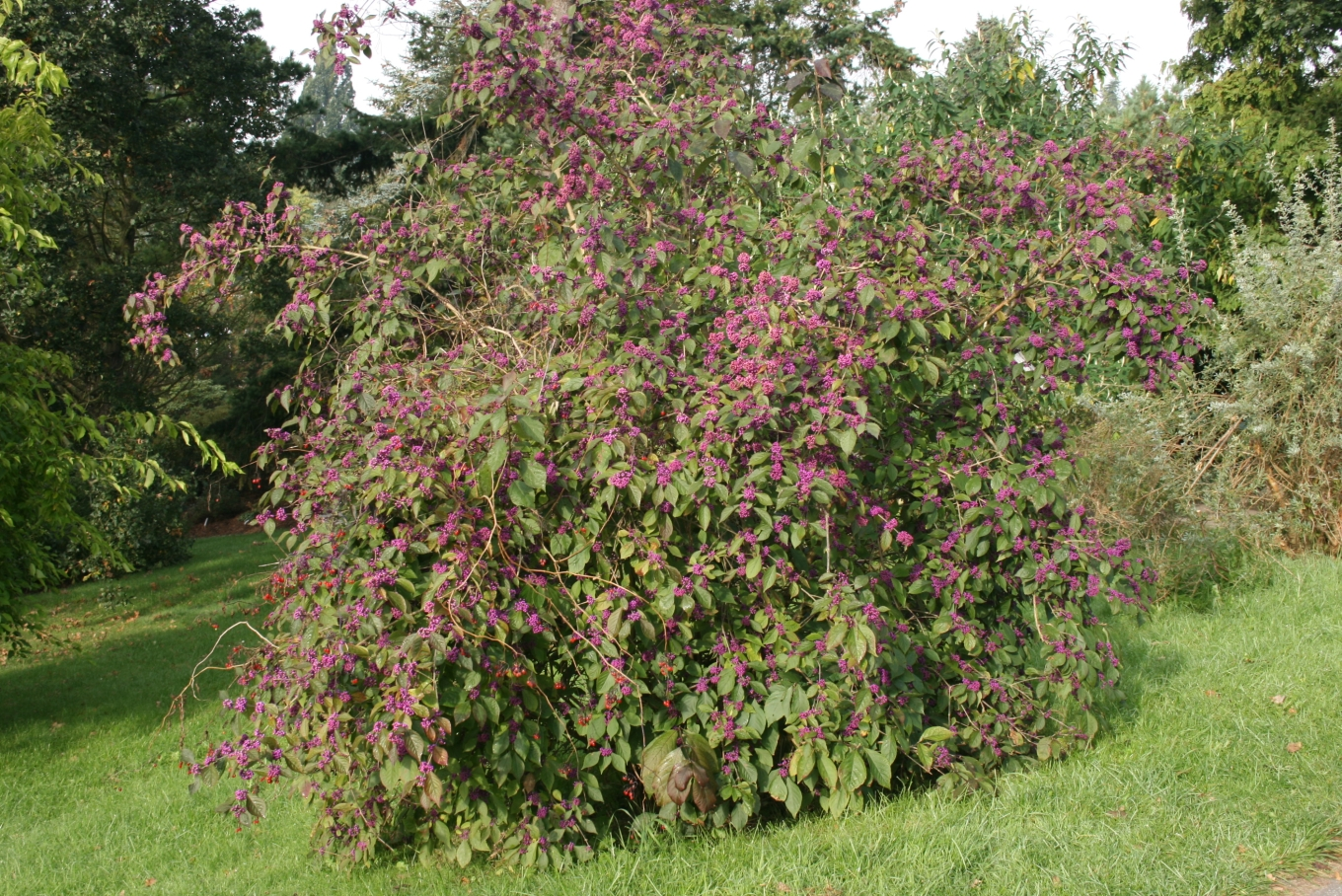 Callicarpa bodnieri: Habit.